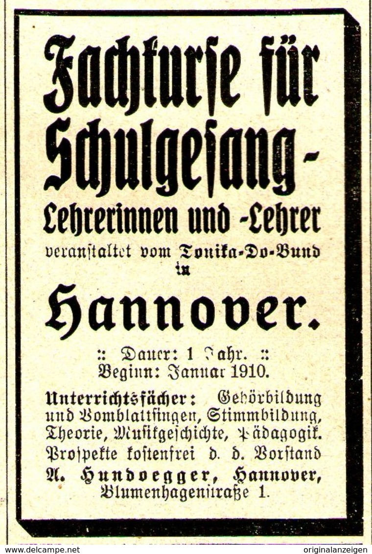 Werbeanzeige der Musikerin und Musikpädagogin Agnes Hundoegger in einer Zeitschrift gegen Ende des Jahres 1909: „Fachkurse für Schulgesang-Lehrerinnen und -Lehrer veranstaltet vom Tonika-Do-Bund in Hannover Dauer: 1 Jahr. Beginn: Januar 1910 Unterrichtsfächer: Gehörbildung und Vomblattsingen, Stimmbildung, Theorie, Musikgeschichte, Pädagogik. Prospekte kostenfrei d. d. Vorstand A. Hundoegger, Hannover, Blumenhagenstraße 1“ Maße des Zeitungs-Ausschnittes circa ca. 45 x 60 mm ...